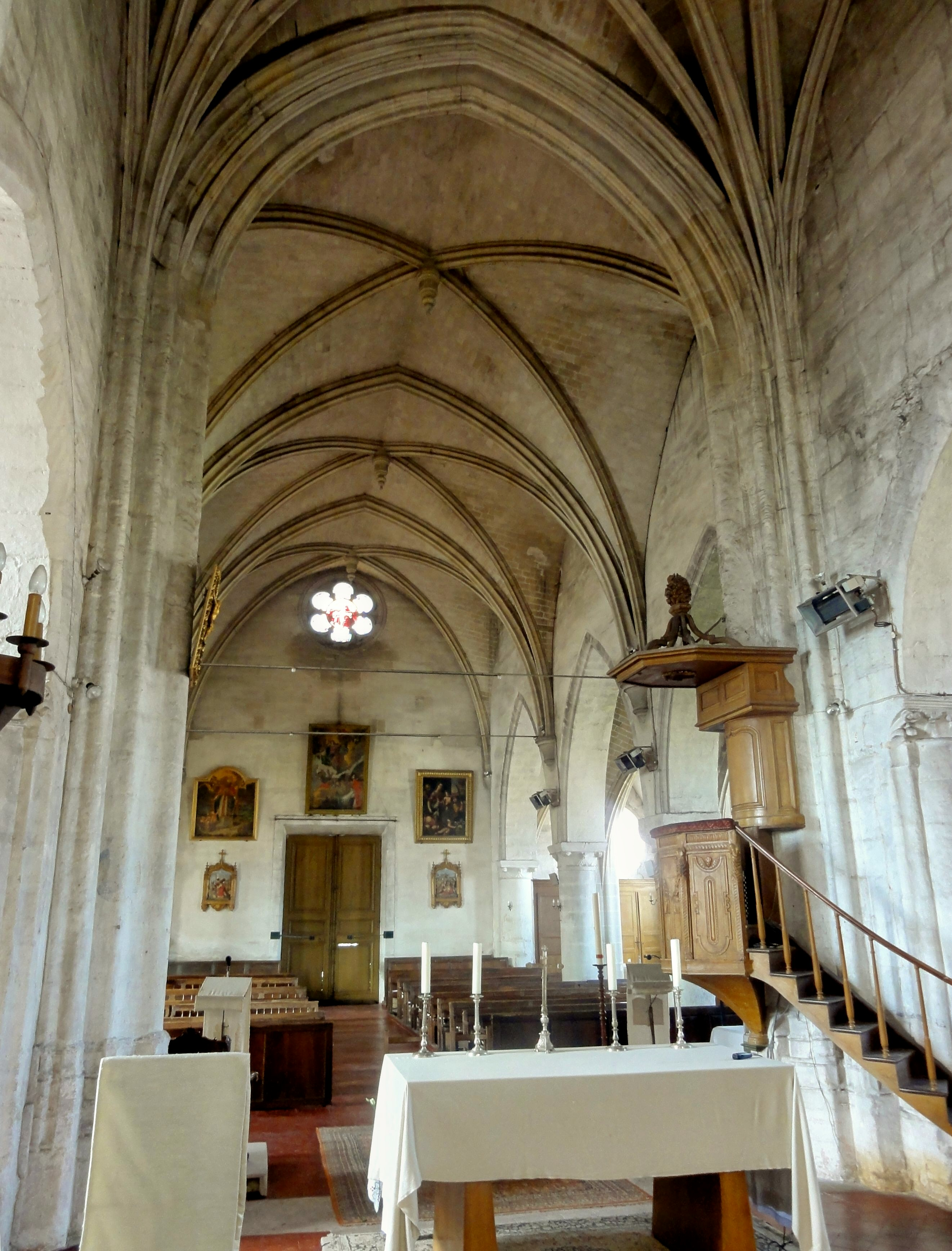 Nef ; vue depuis la croisée du transept à l'est.